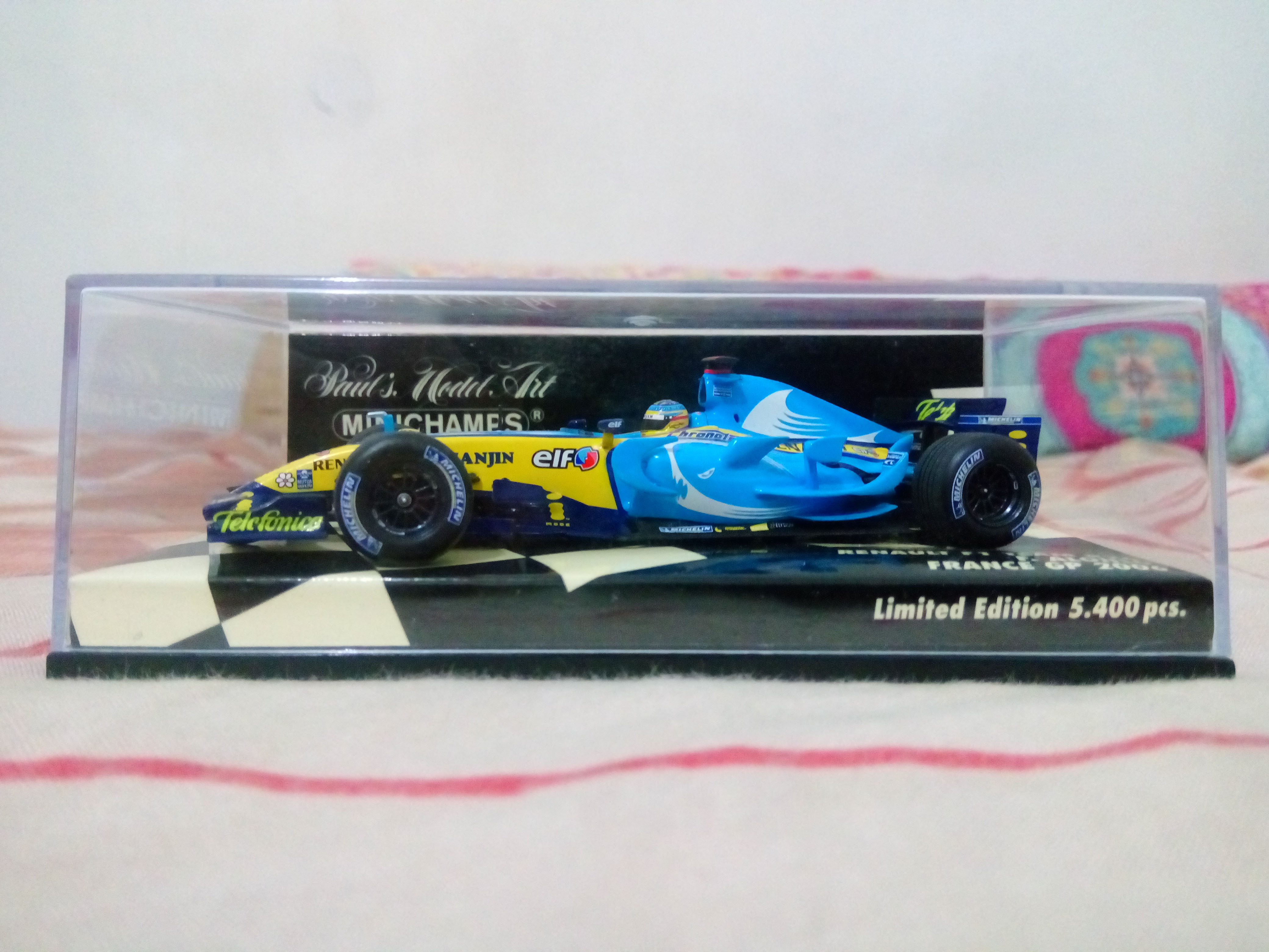 Diecast Fernando Alonso 2006